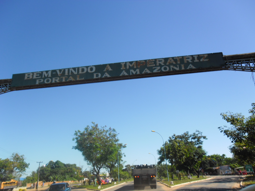 IMPERATRIZ MAmperatriz ma